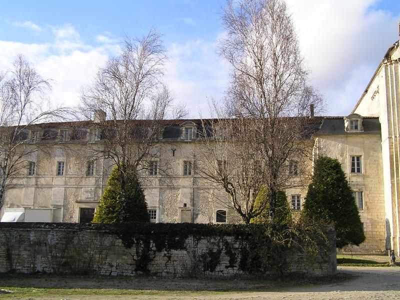 abbaye de Bassac